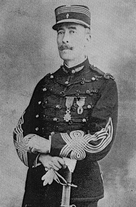 Fernand de Montessus de Ballore o Fernand Jean Batiste Marie Montessus de Ballore (Dompierre-sons-Sanvignes, Saona y Loira, Francia, 19 de junio de 1851 - Santiago de Chile, 31 de enero de 1923 fue un conde y sismólogo francés y el primer director del Servicio Sismológico de Chile.